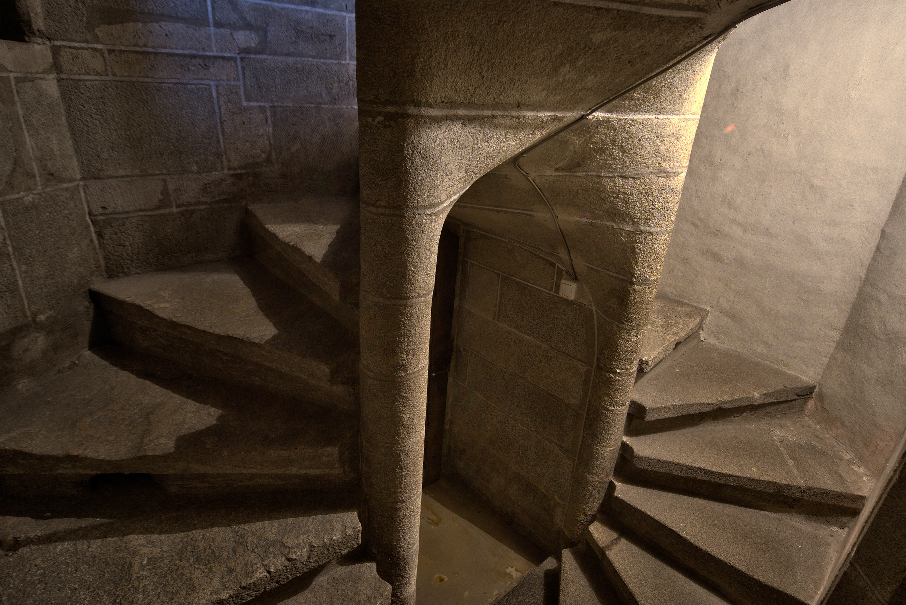 Doppelarmige Wendeltreppe als Aufgang zum Chor, Stadtpfarrkirche Eferding